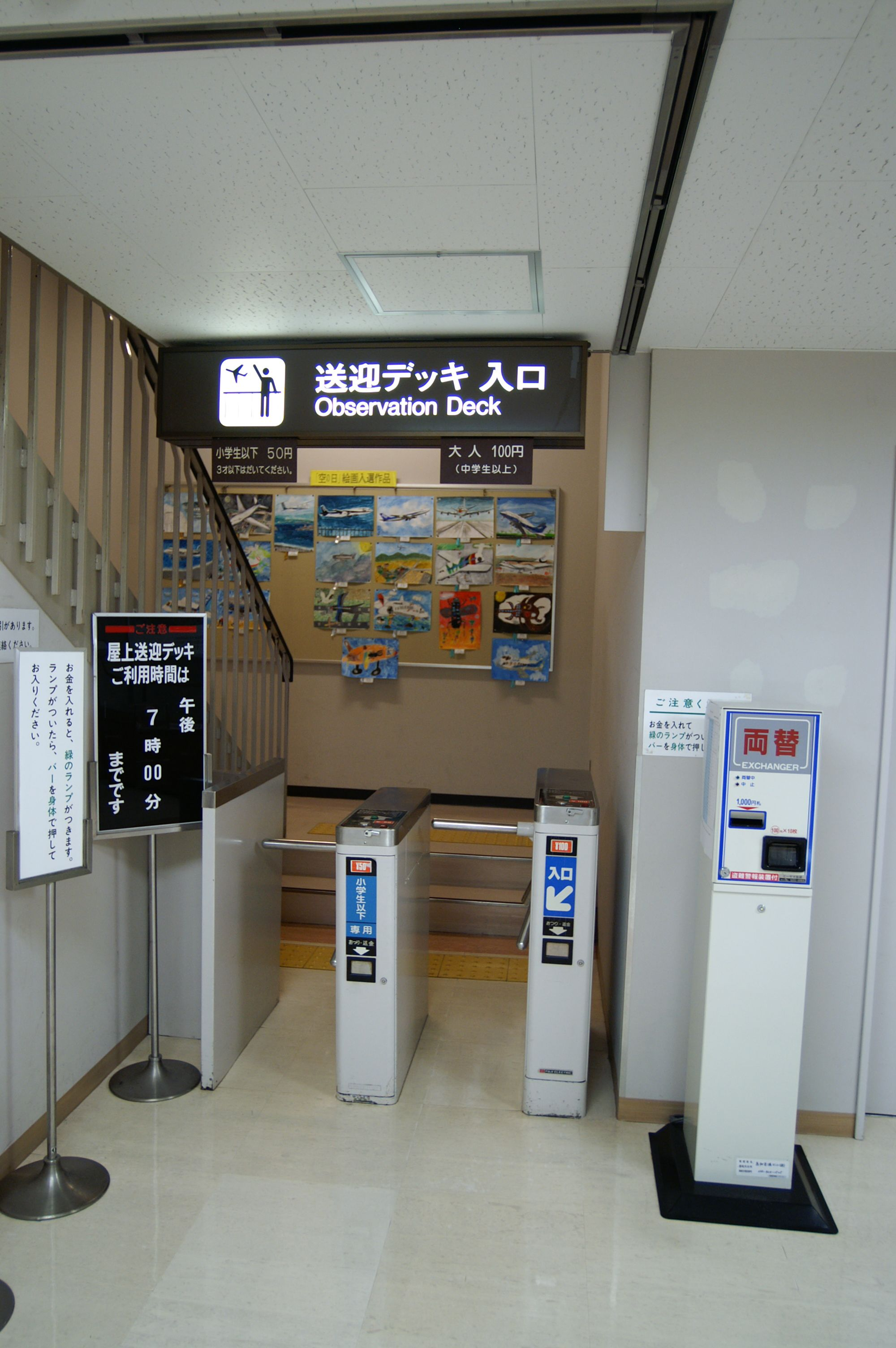 大人(中学生以上)100円、小学生以下50円。 (2006/05/21 Kochi Ryoma Airport, Nangoku, Kochi, JAPAN) 送迎デッキ入口